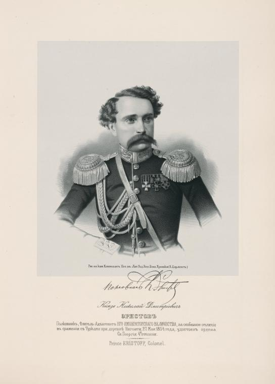 Prince Nicholas Eristavi, Colonel (1823-1856)